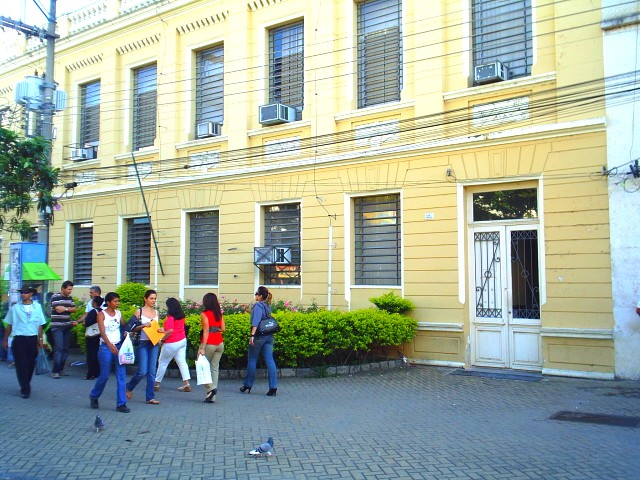 Fachada da Diretoria de Ensino - Região de Guaratinguetá no Centro Histórico